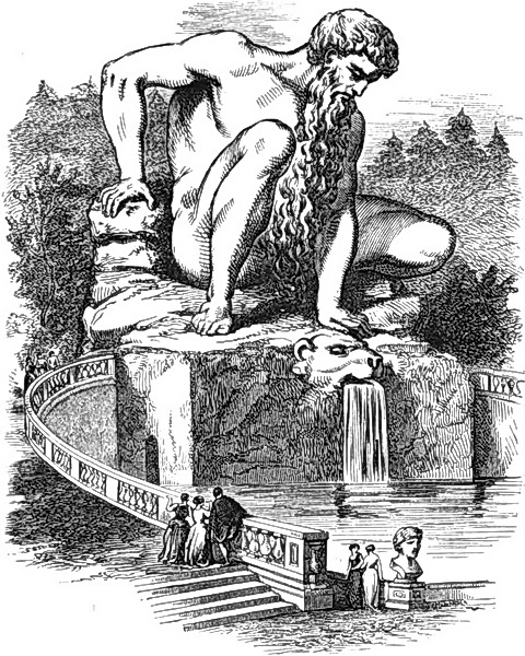 Vue d'artiste du Jupiter appenin (Pratolino,Italie)